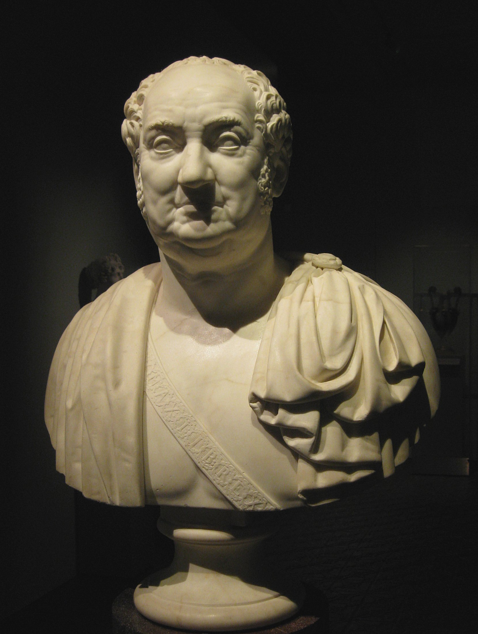 Ernst von Bandel: Koenig Max I. Joseph, 1826, Marmor, Bayerisches Nationalmuseum in München